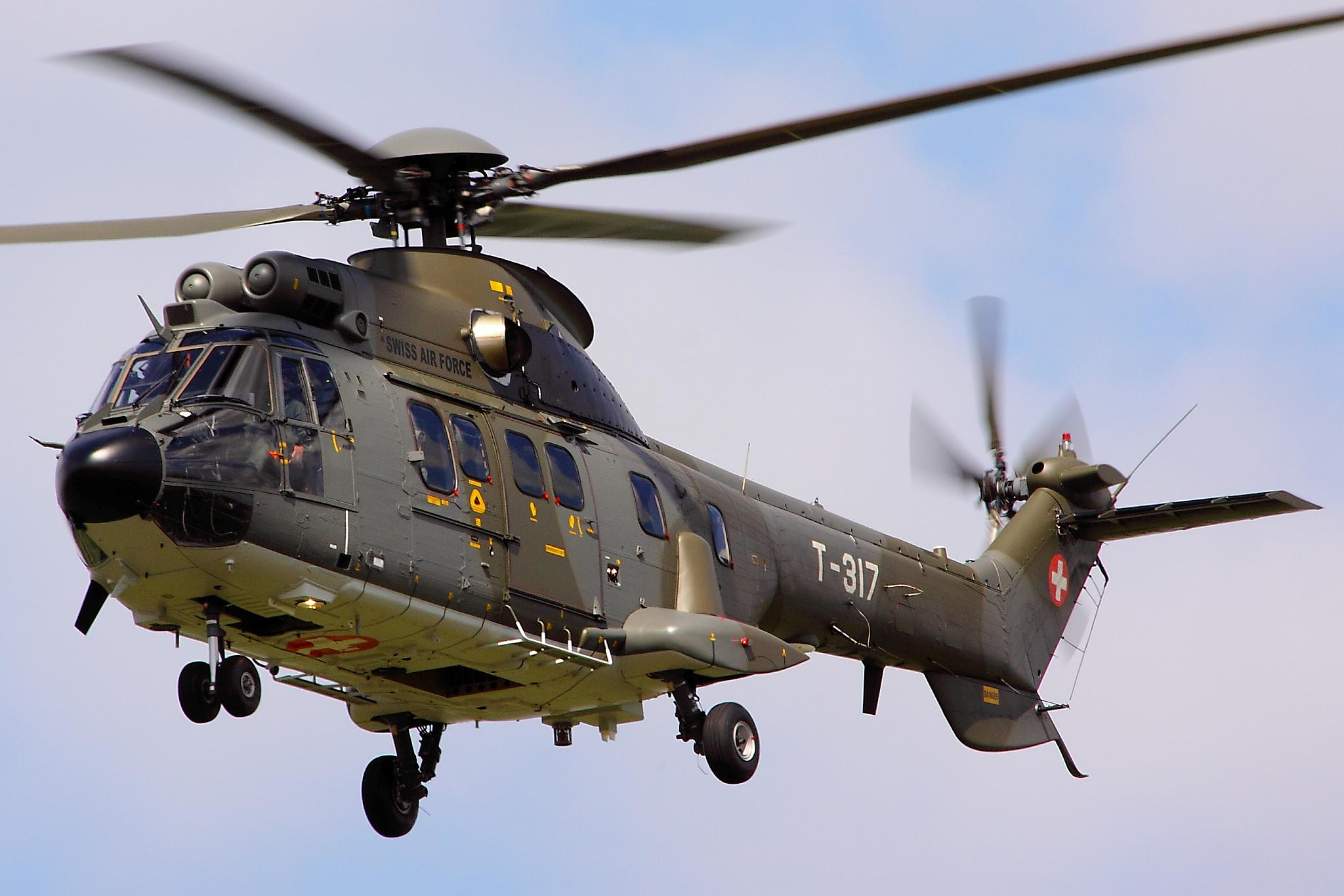 AS332 Super Puma - RIAT 2012